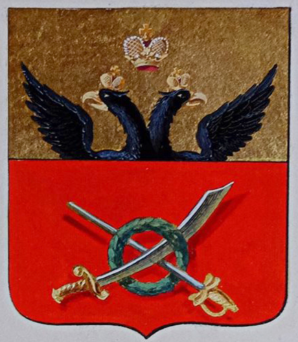 Беларуская (тарашкевіца): Чавусы (Čavusy). Расейскі герб места